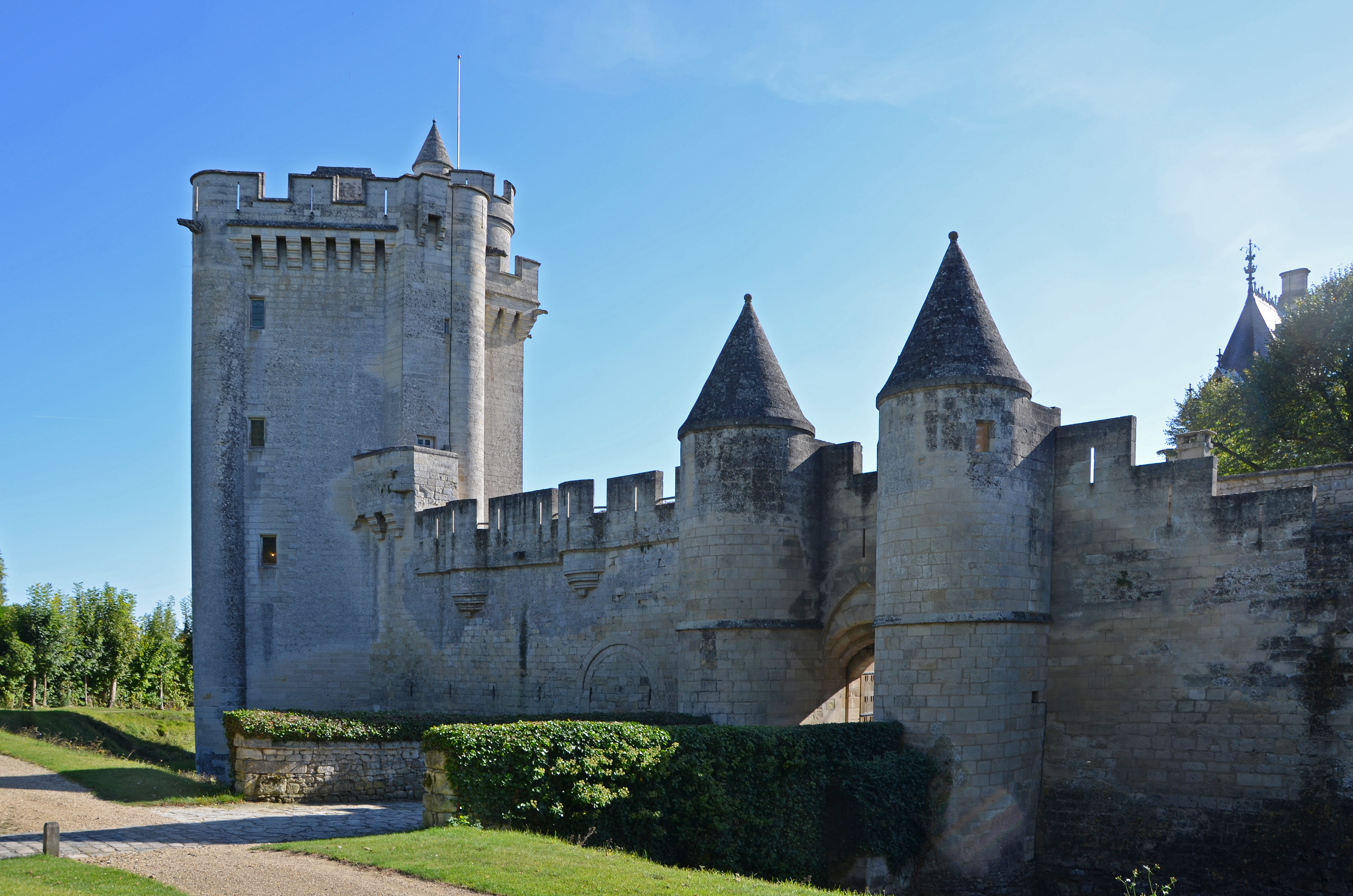 Donjon de Vez, Oise, Picardie, France